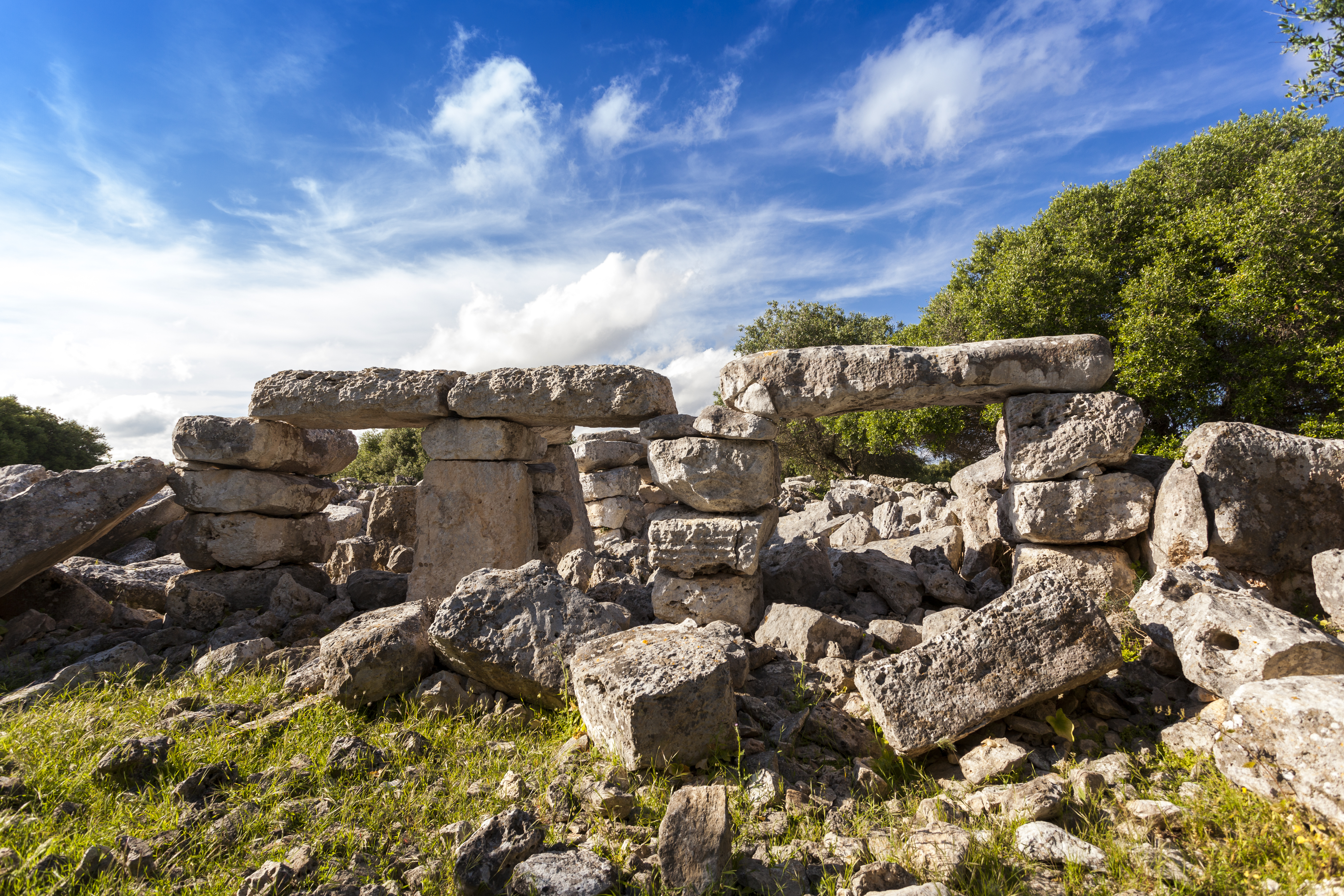 Façana del Monument de na Comerma de sa Garita vista del pati.